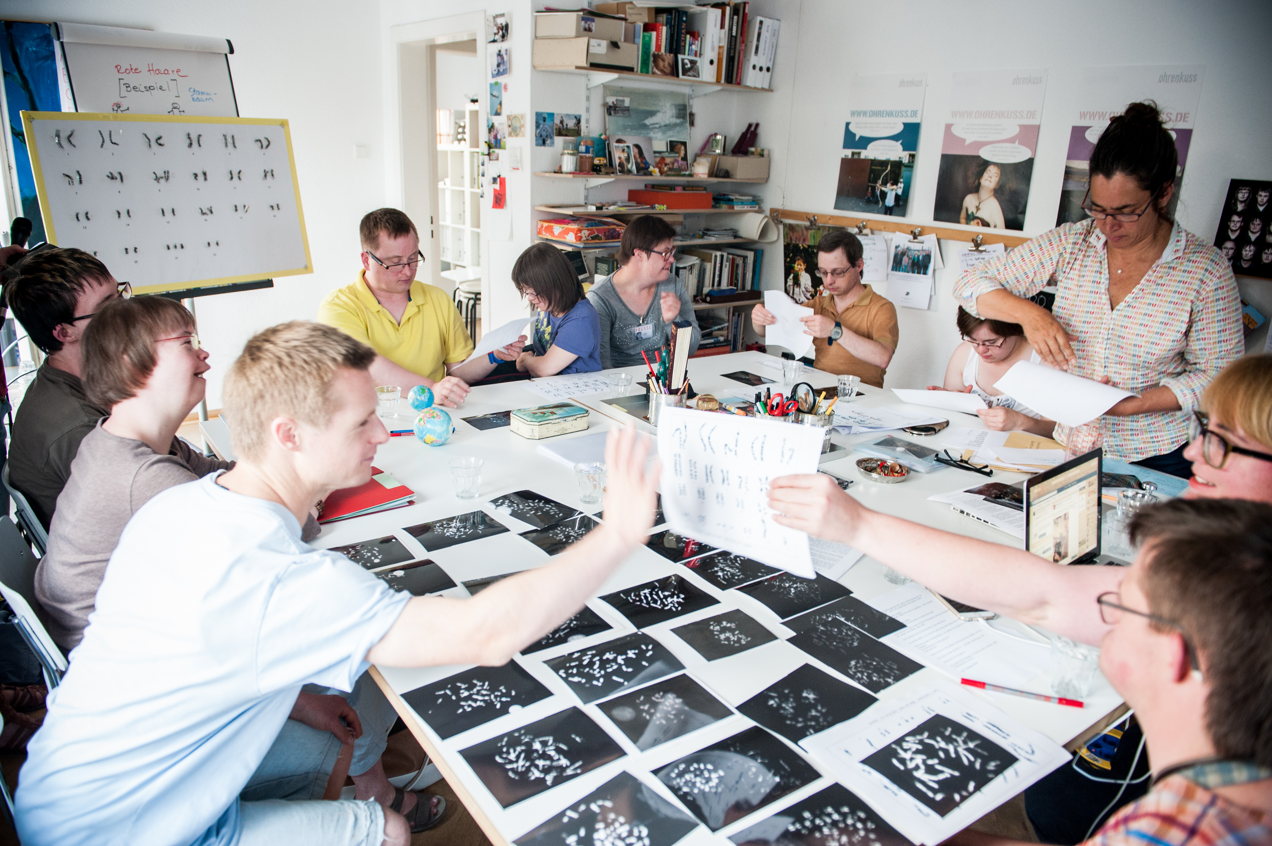 Mitarbeiter des Forschungsprojektes bei einem Workshop zum Thema Chromosomen